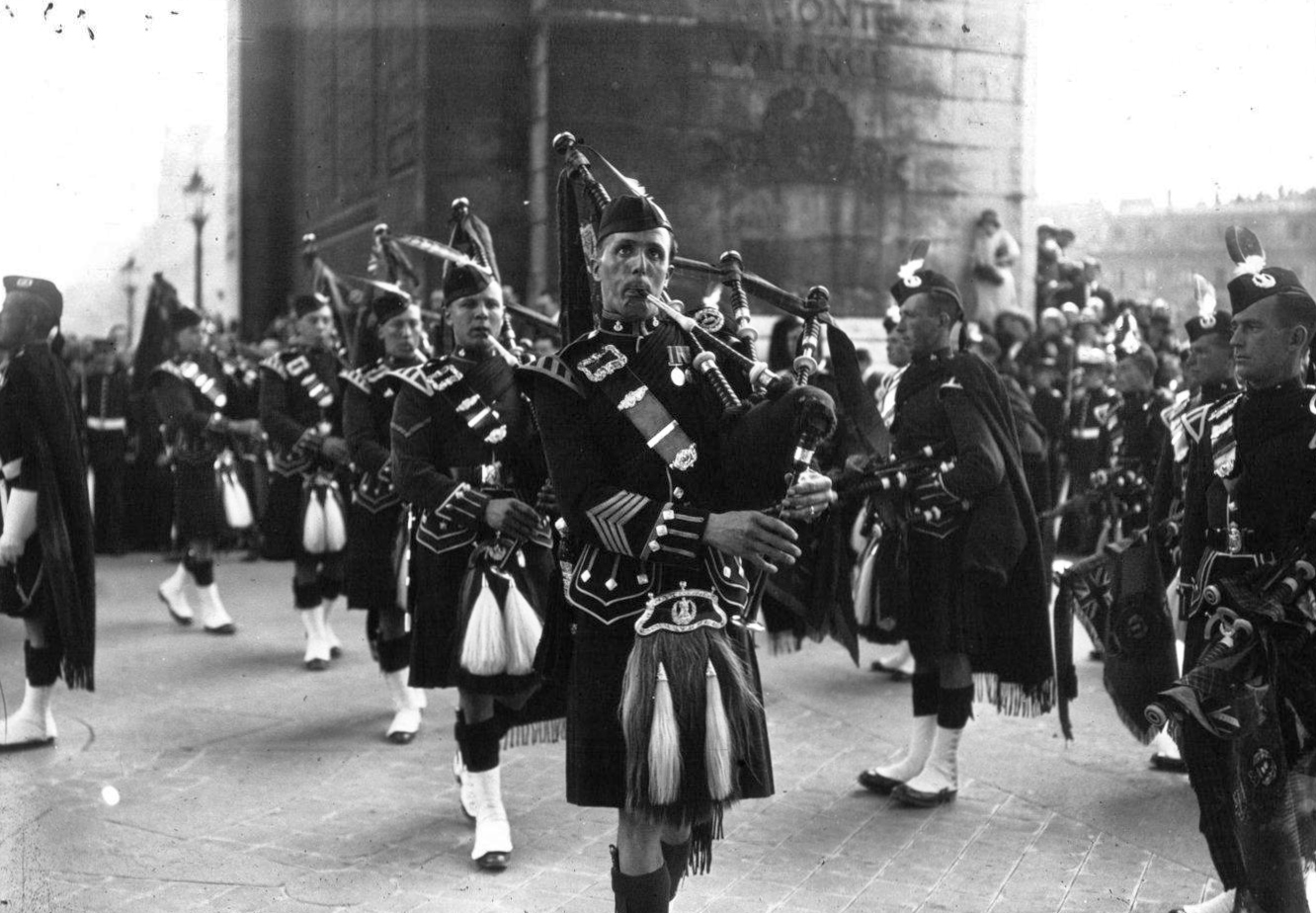 Les Highlanders à Paris au Poilu Inconnu